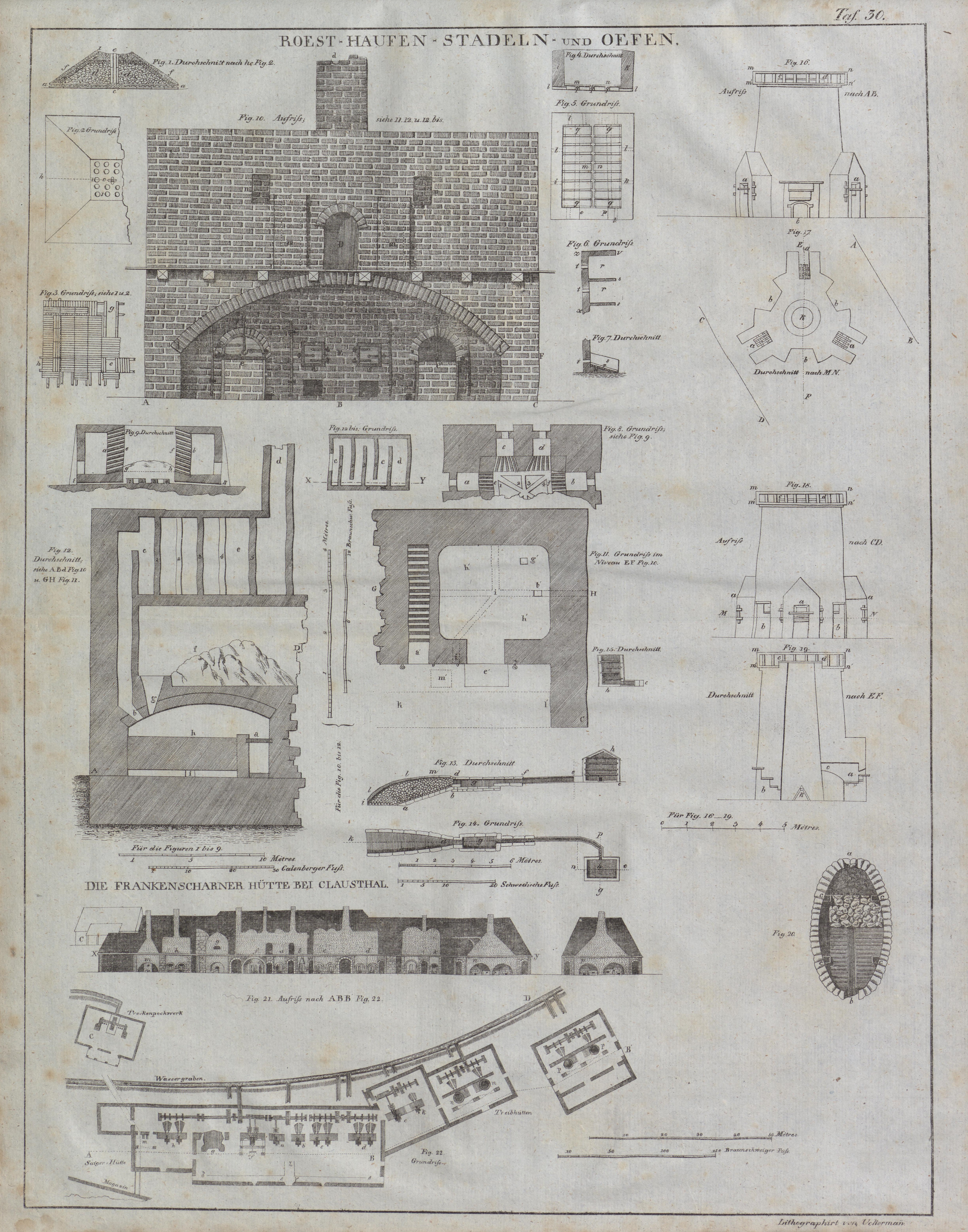 Abbildung aus: Atlas zu des Herrn von Villefosse Mineral-Reichthum